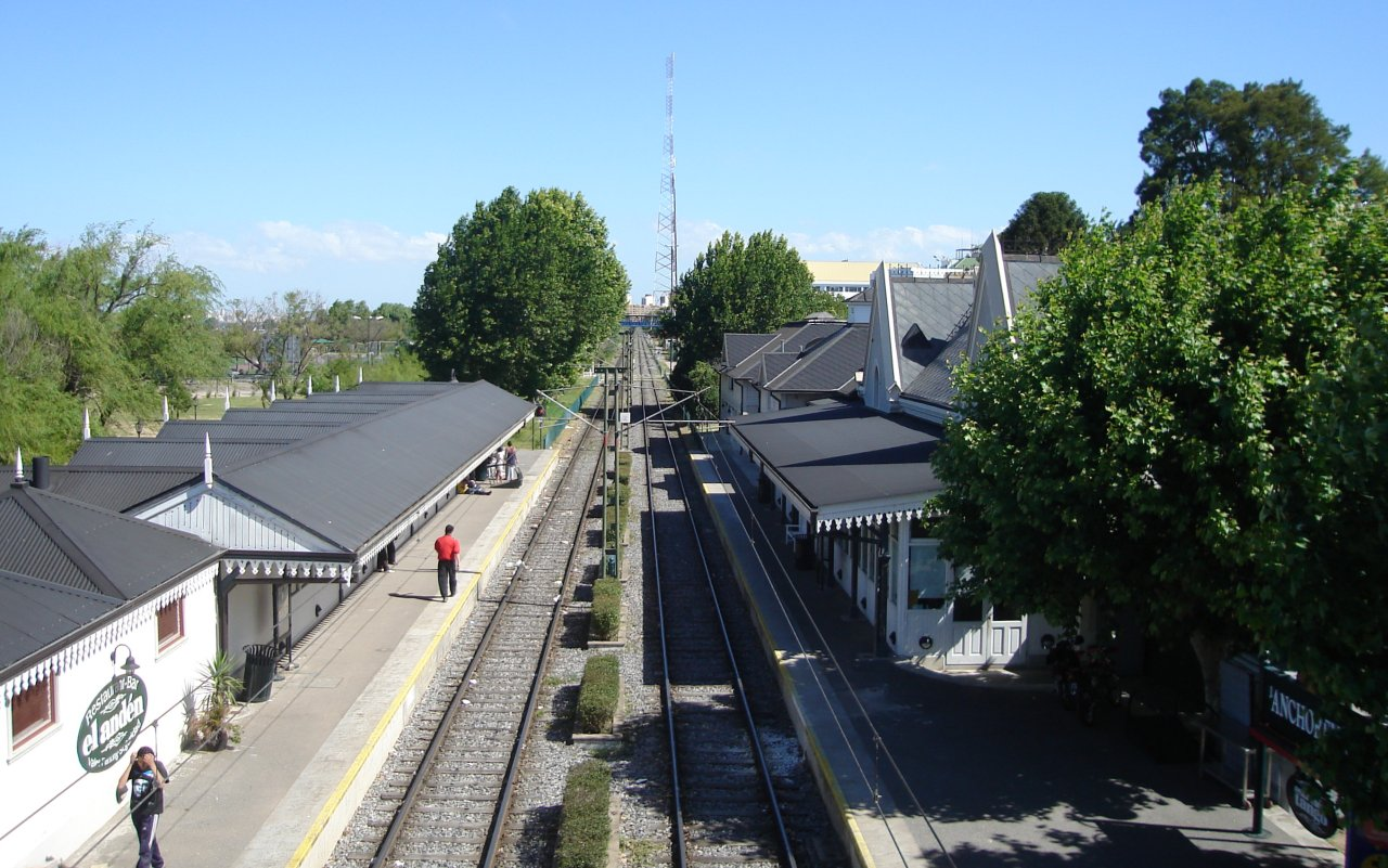 Vista de la estación Anchorena del Tren de la Costa, Martínez, partido de San Isidro, provincia de Buenos Aires, República Argentina.